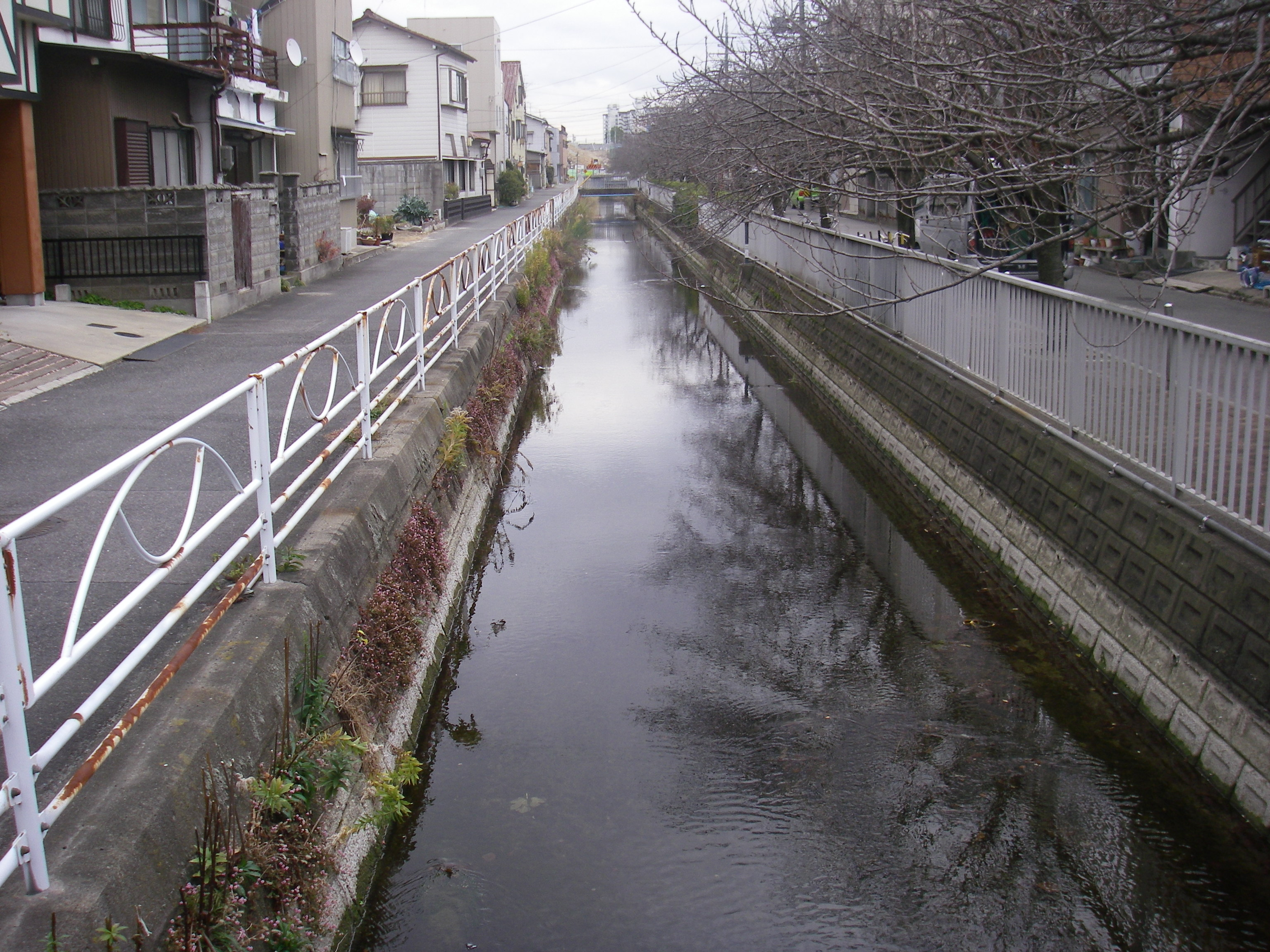 名古屋市の庄内用水、堀川（黒川）と分岐後、北区辻町八丁目にて。